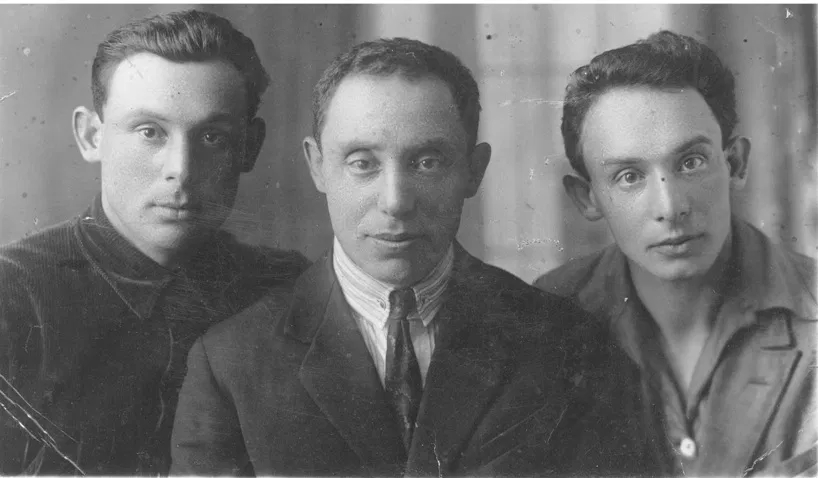 Змітрок Бядуля з братамі